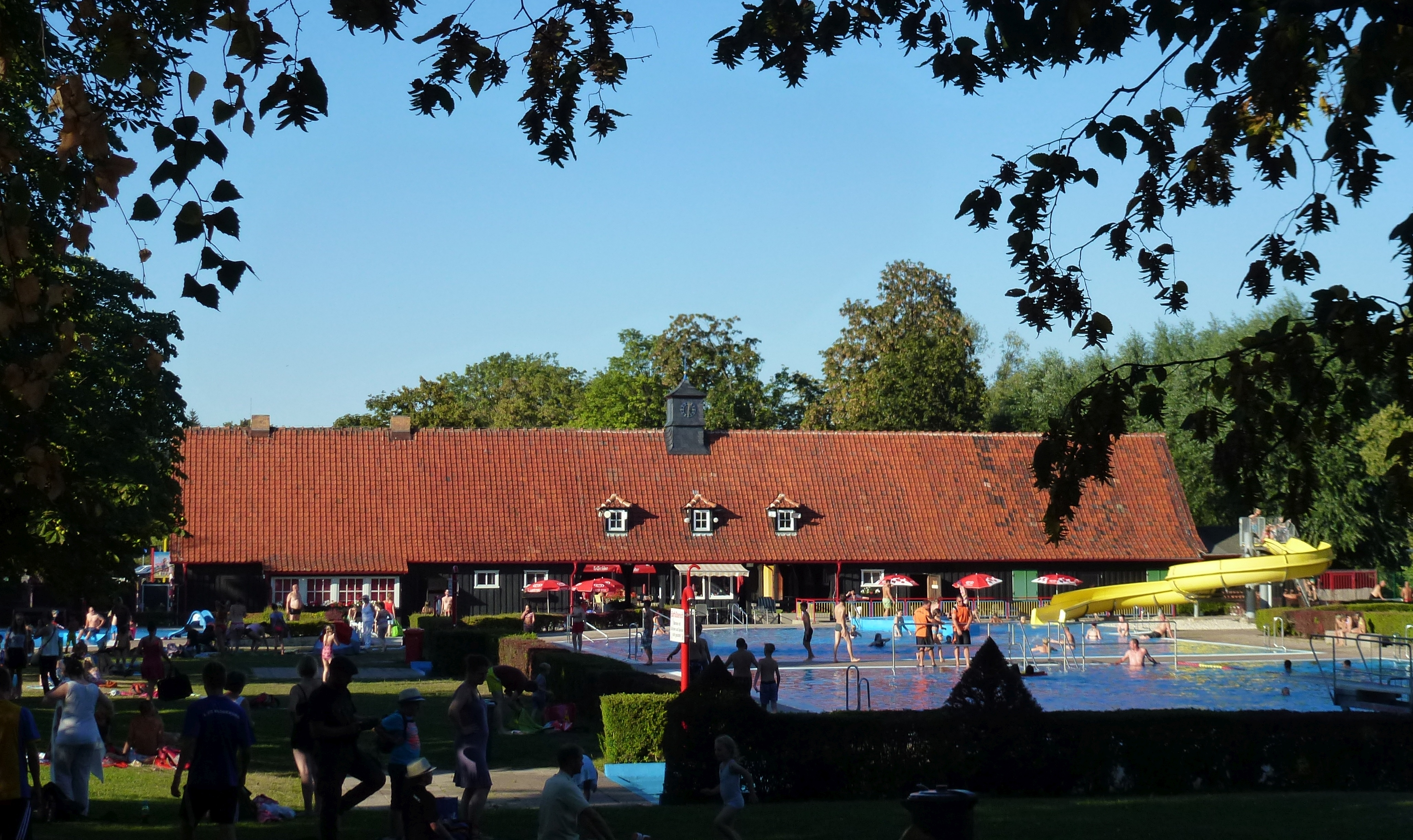 Blick auf das Waldhofbad Wernigerode in der Waldhofstraße.